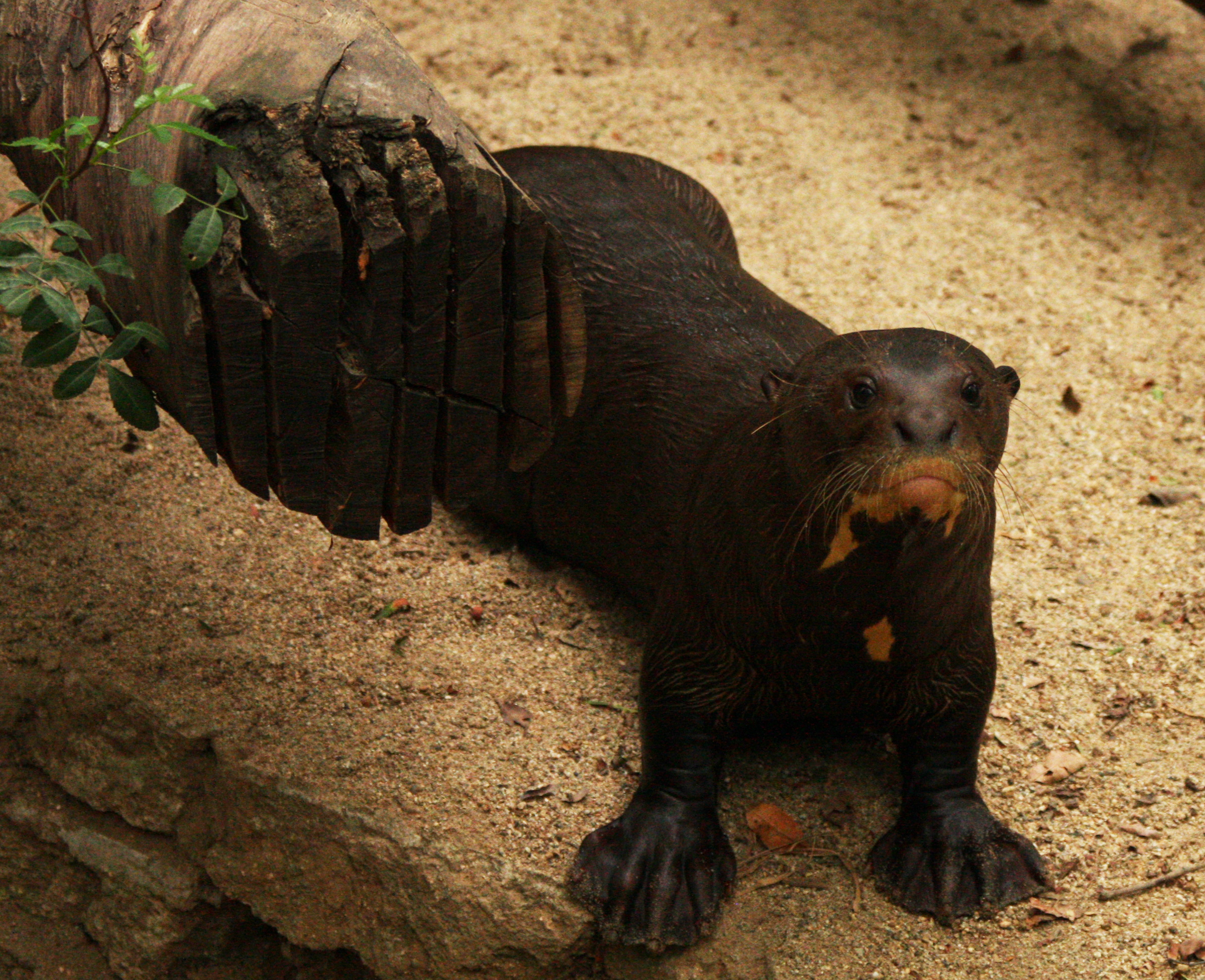 Giant Otter (Pteronura brasiliensis)